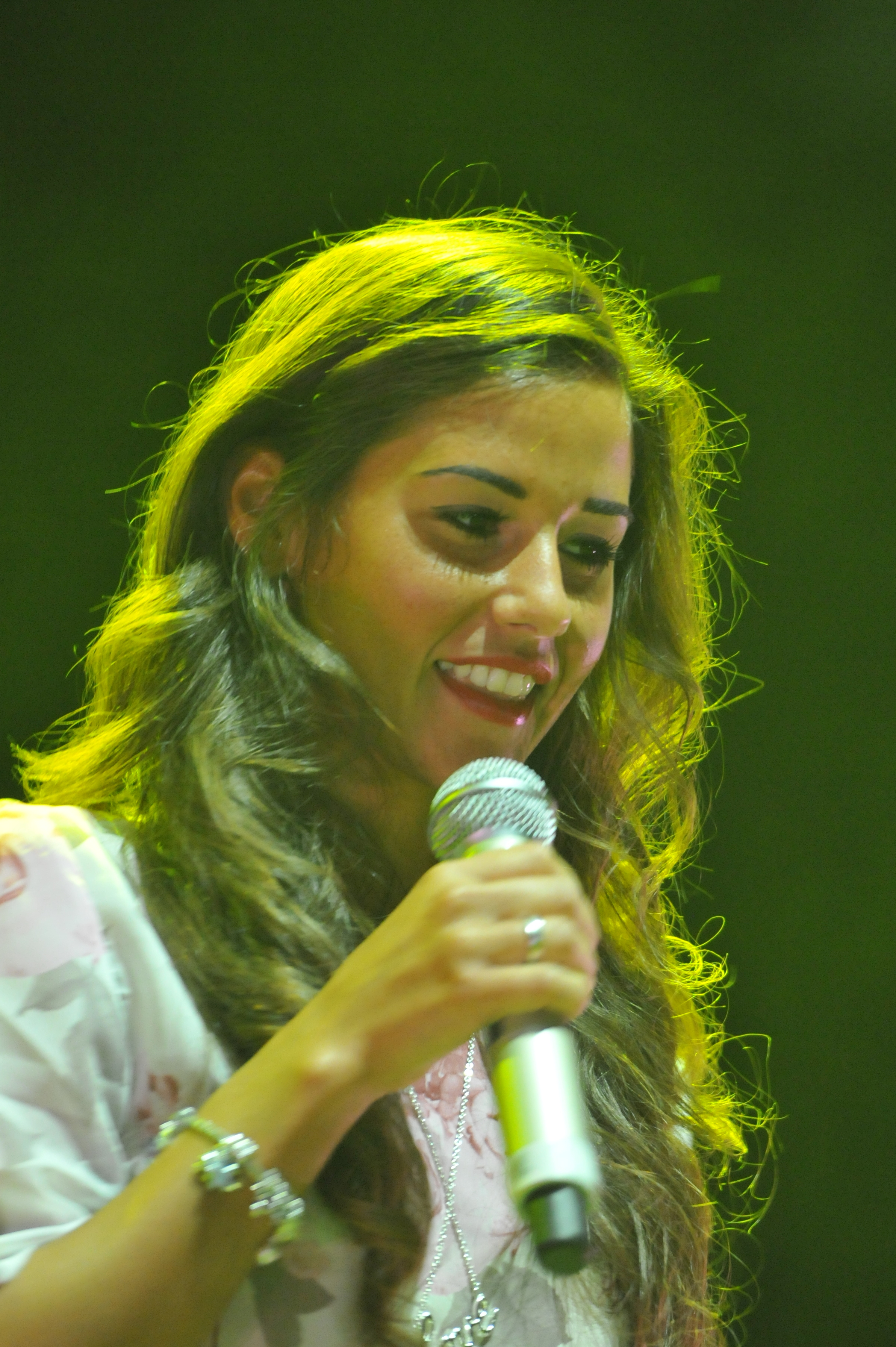 DSDS - Live on Tour. 27. Juli 2014, Stadthalle Wien.